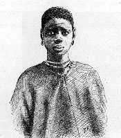 Jeune fille khassonkaise (illustration de Côte occidentale d'Afrique du Colonel Frey), fig. 57, p. 94